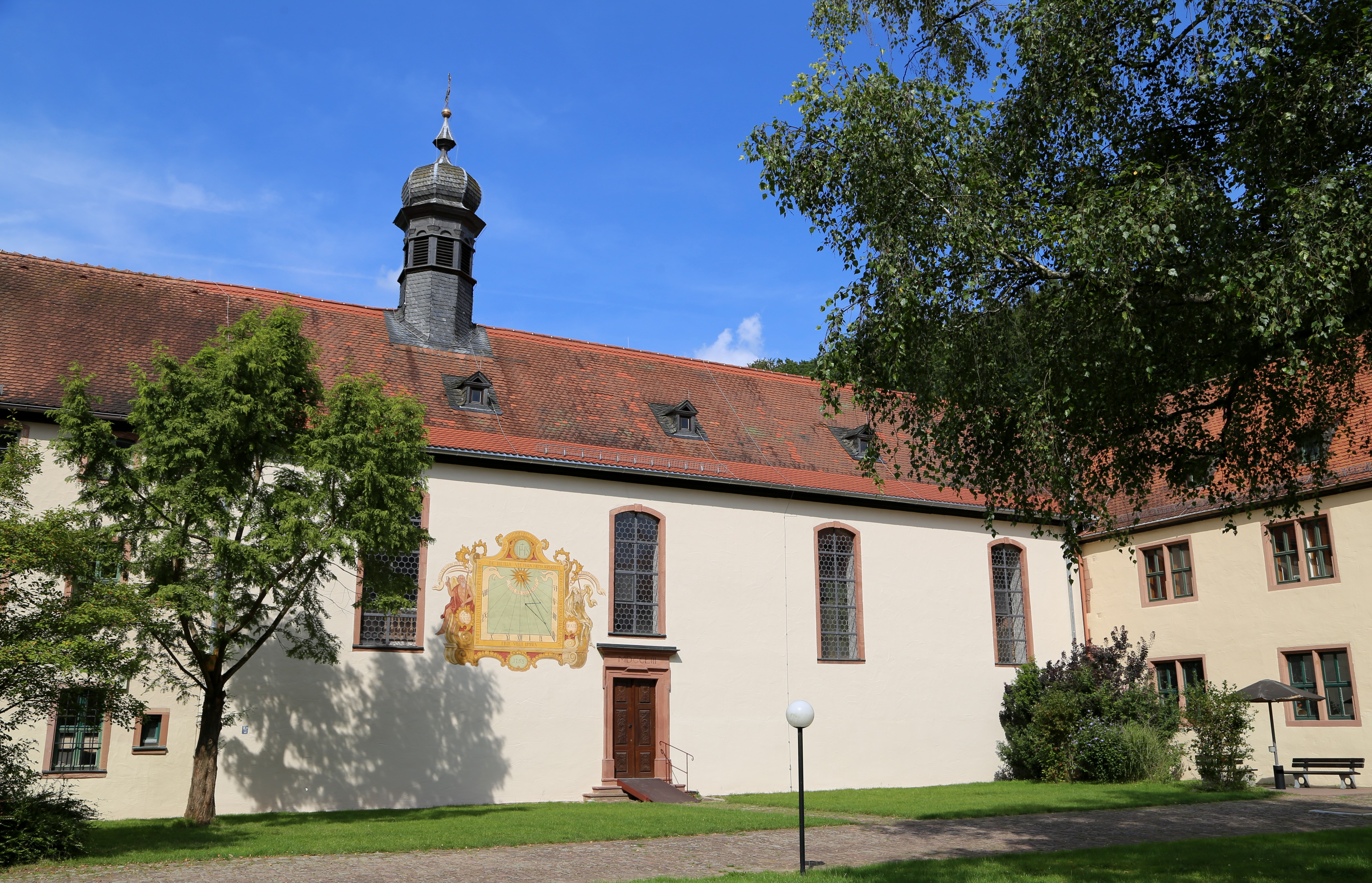 Elsenfeld; Ehemaliges Zisterziensernonnenkloster 1232–1567